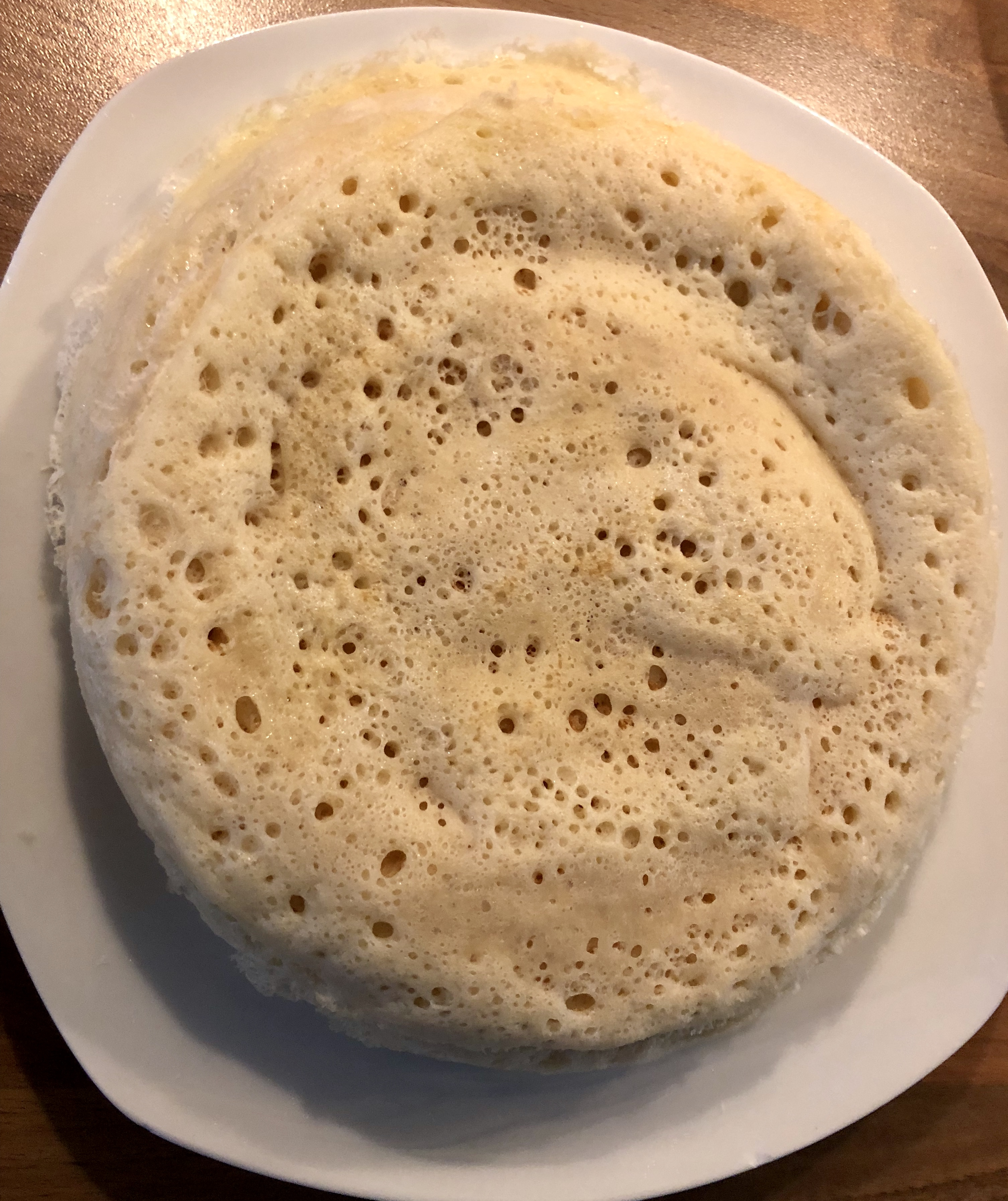 Einer aus Weizenmehl und Hefe hergestellter Pfannekuchen